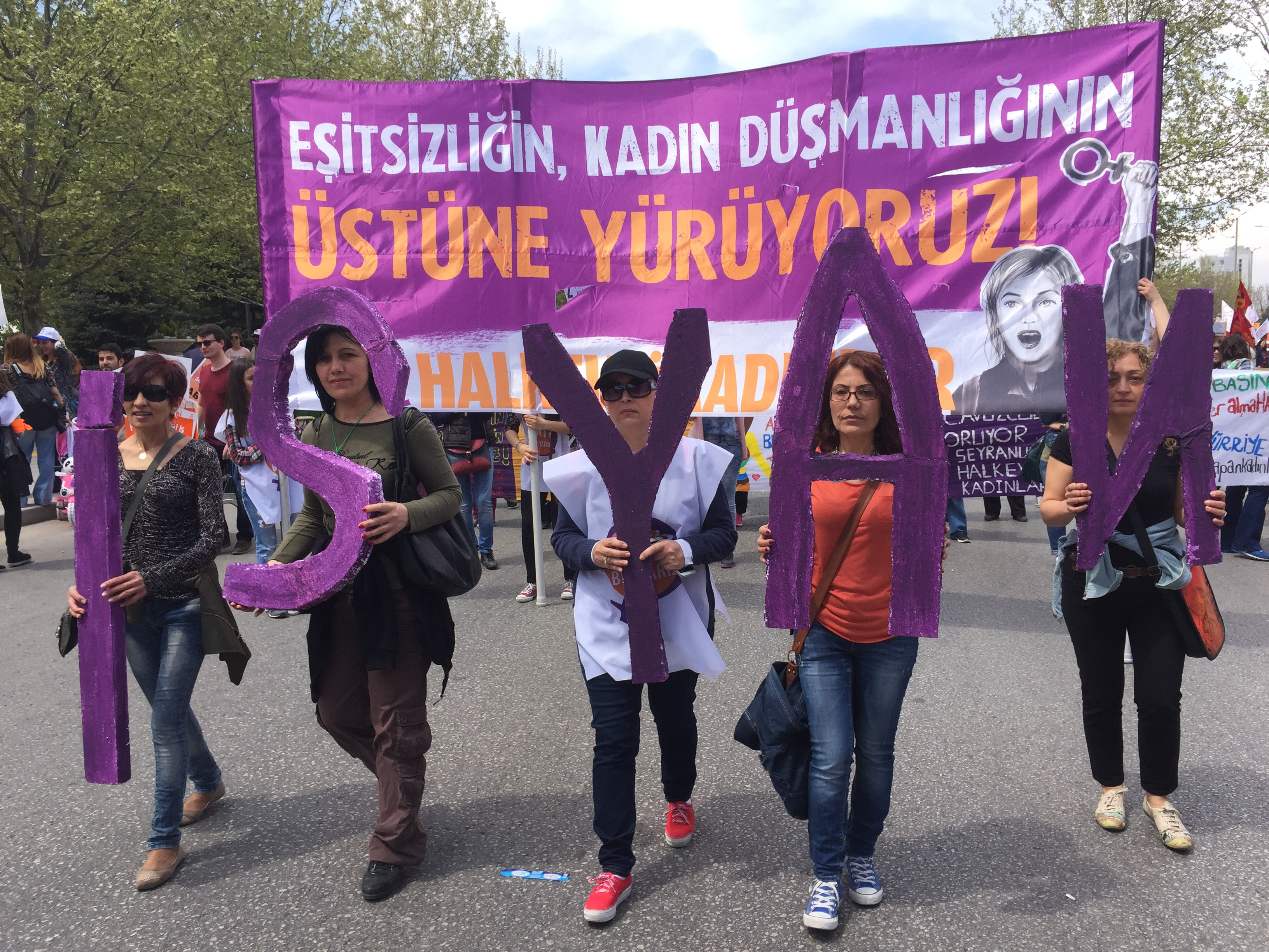 1 May 2015 demonstration